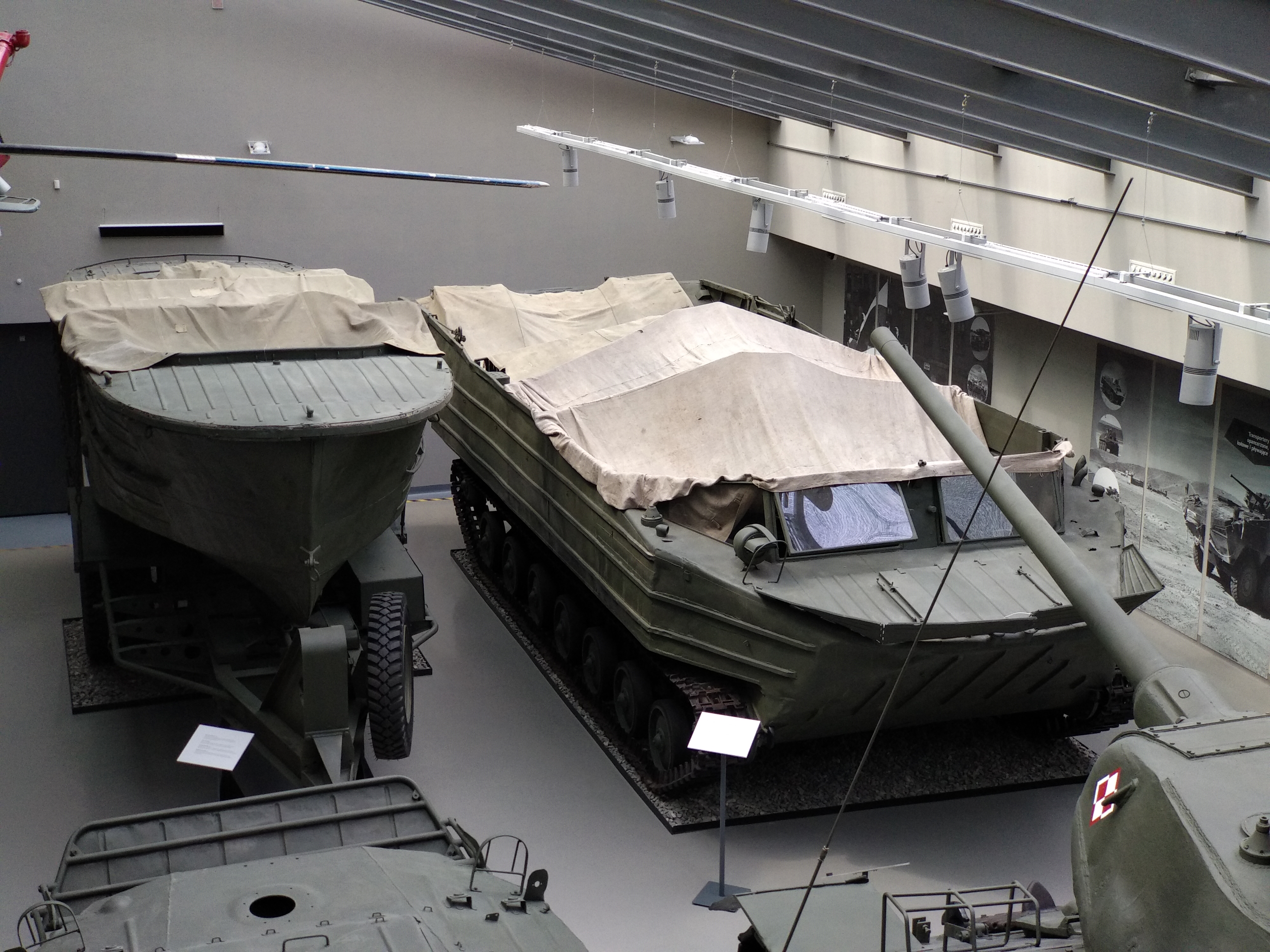 Rzeczny kuter holowniczy typu BMK-90 i pływający transporter gąsienicowy PTG, eksponowane w Muzeum Fortyfikacji i Broni "Arsenał" w Zamościu.